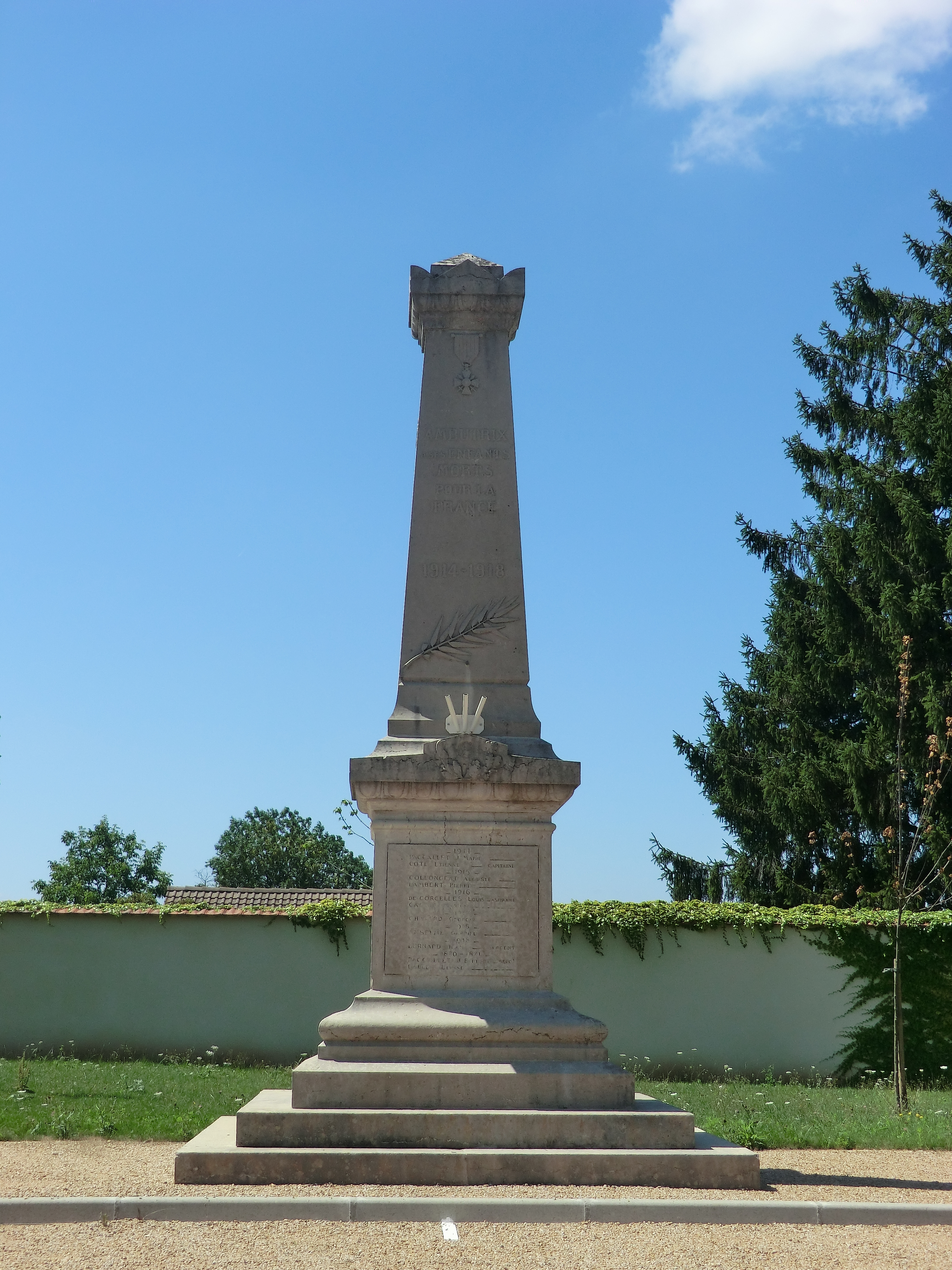 Monument aux morts d'Ambutrix.